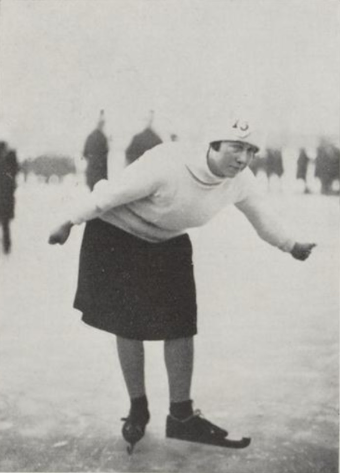 Jitske de Boer tijdens een kortebaan wedstrijd in Leeuwarden.